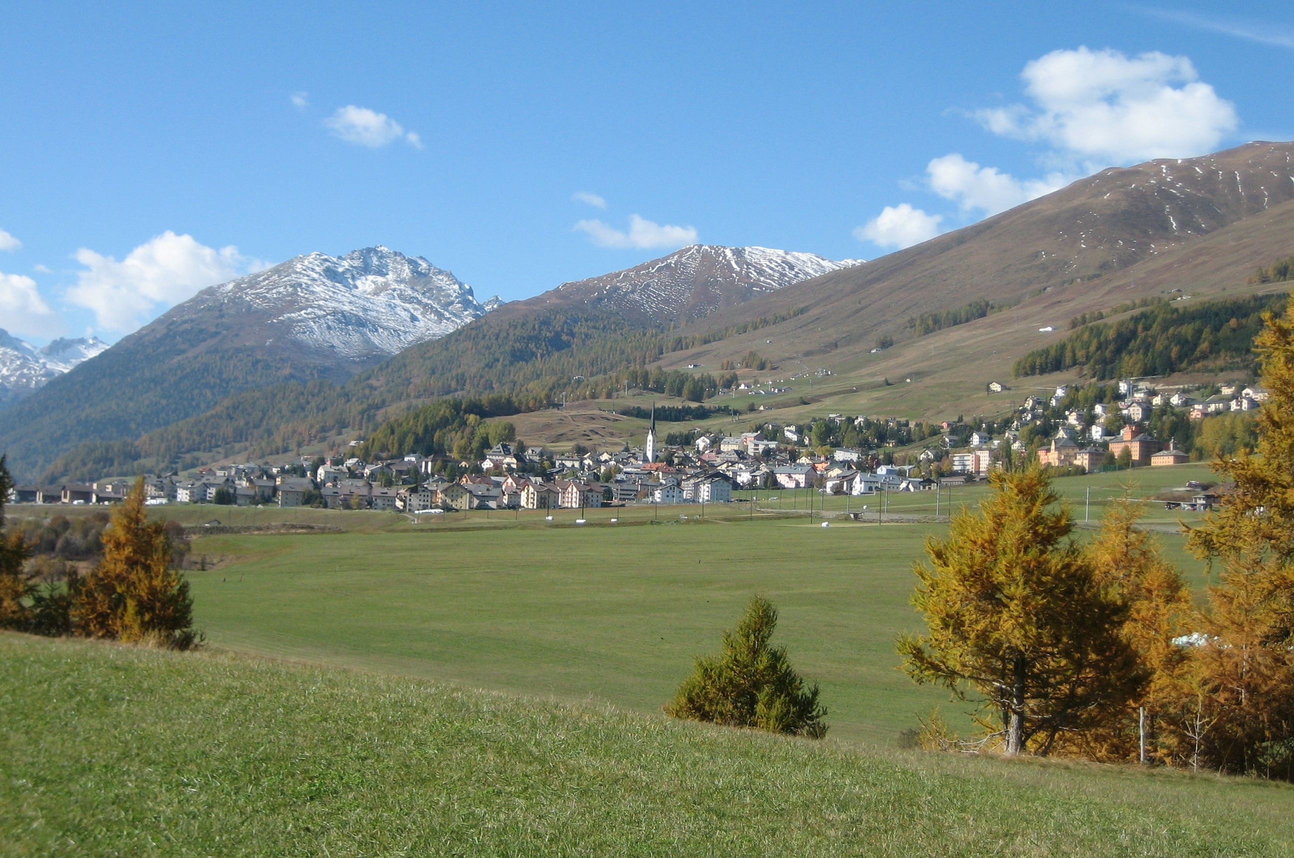 Zuoz